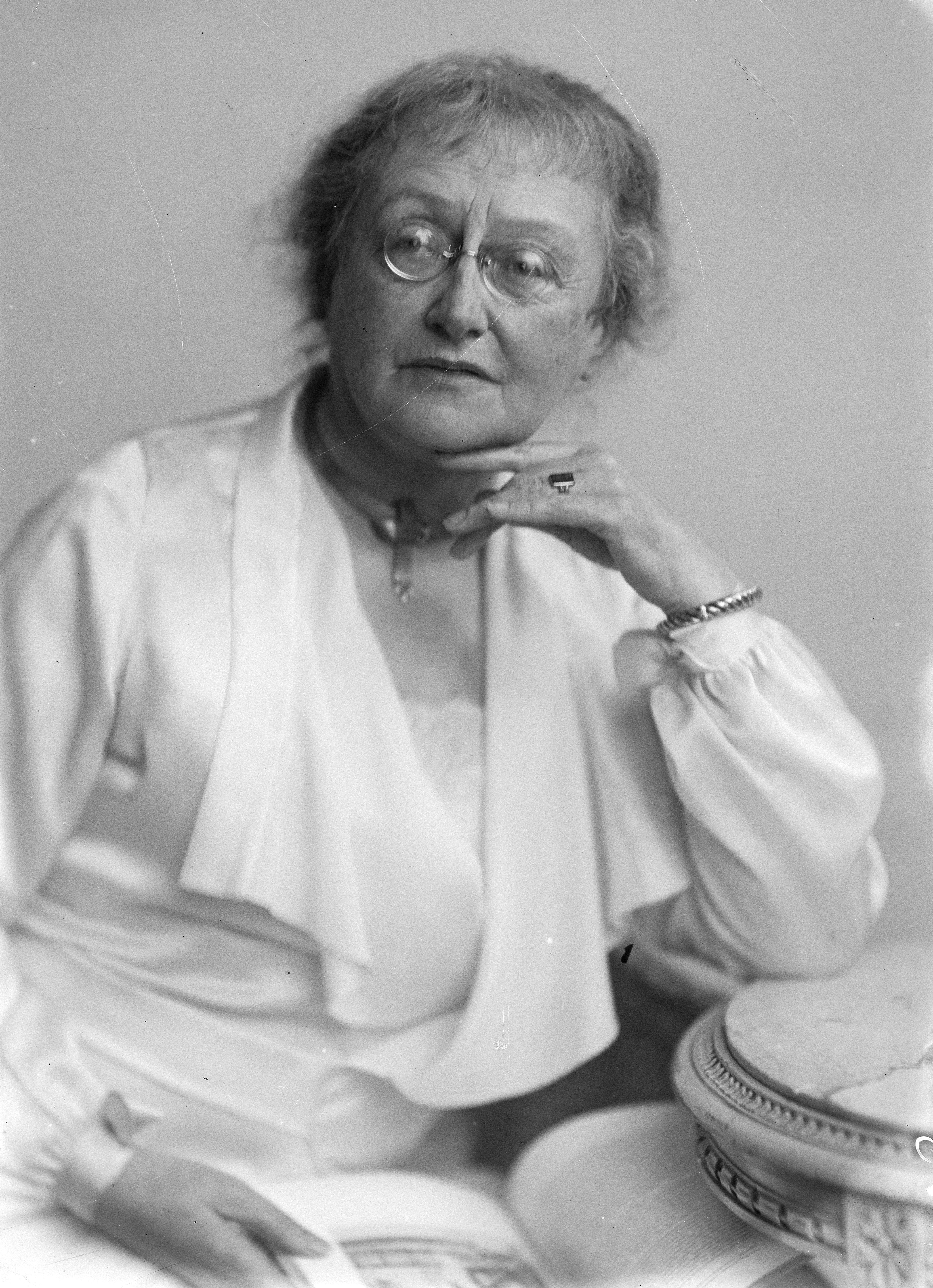 Portret van Freule Elisabeth Carolina Boddaert (ca. 1940)